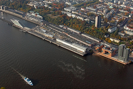 Fischmarkt-Hamburg-Areal-Luftaufnahme